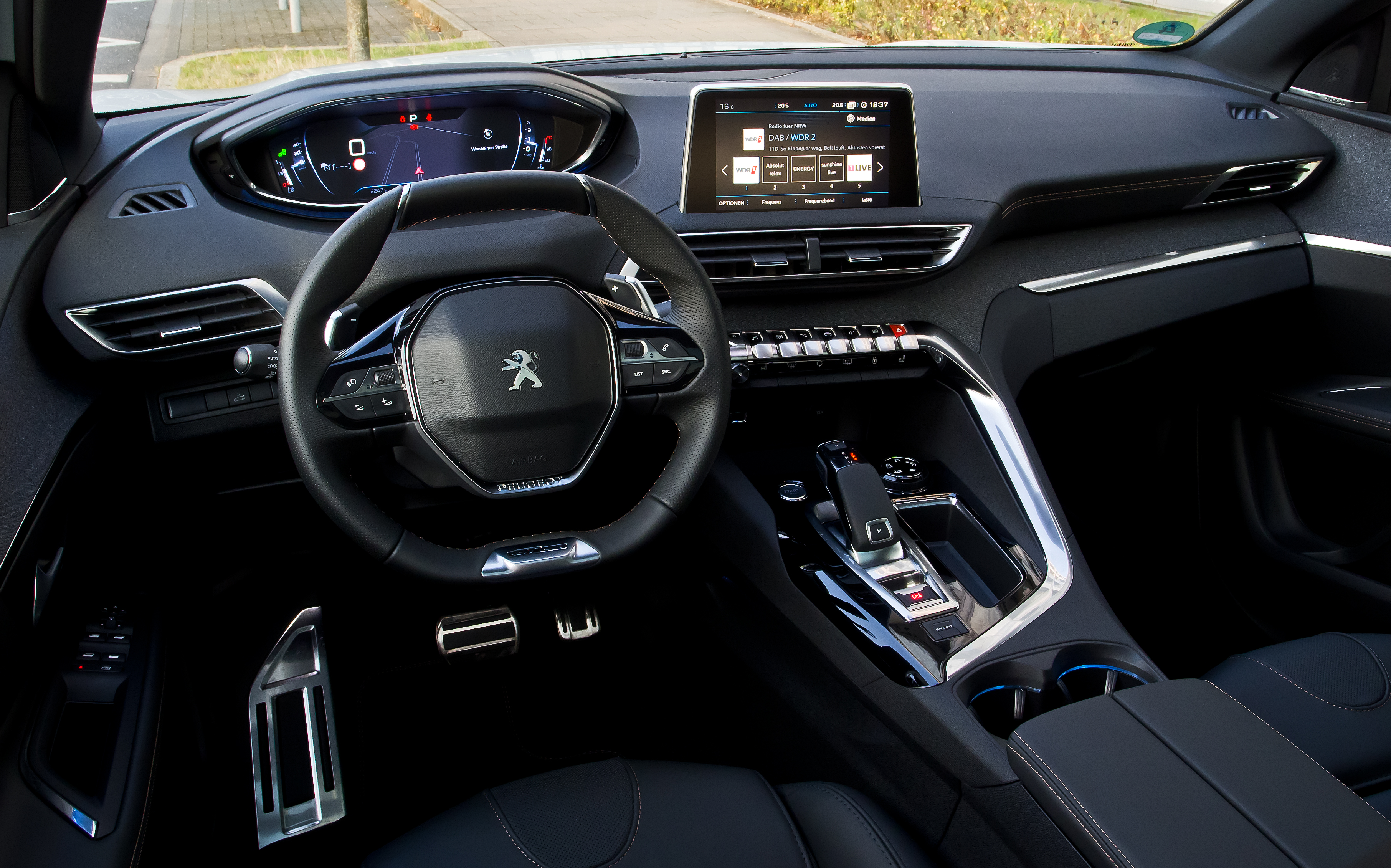 Peugeot 3008 THP 165 EAT6 Allure GT-Line (II)